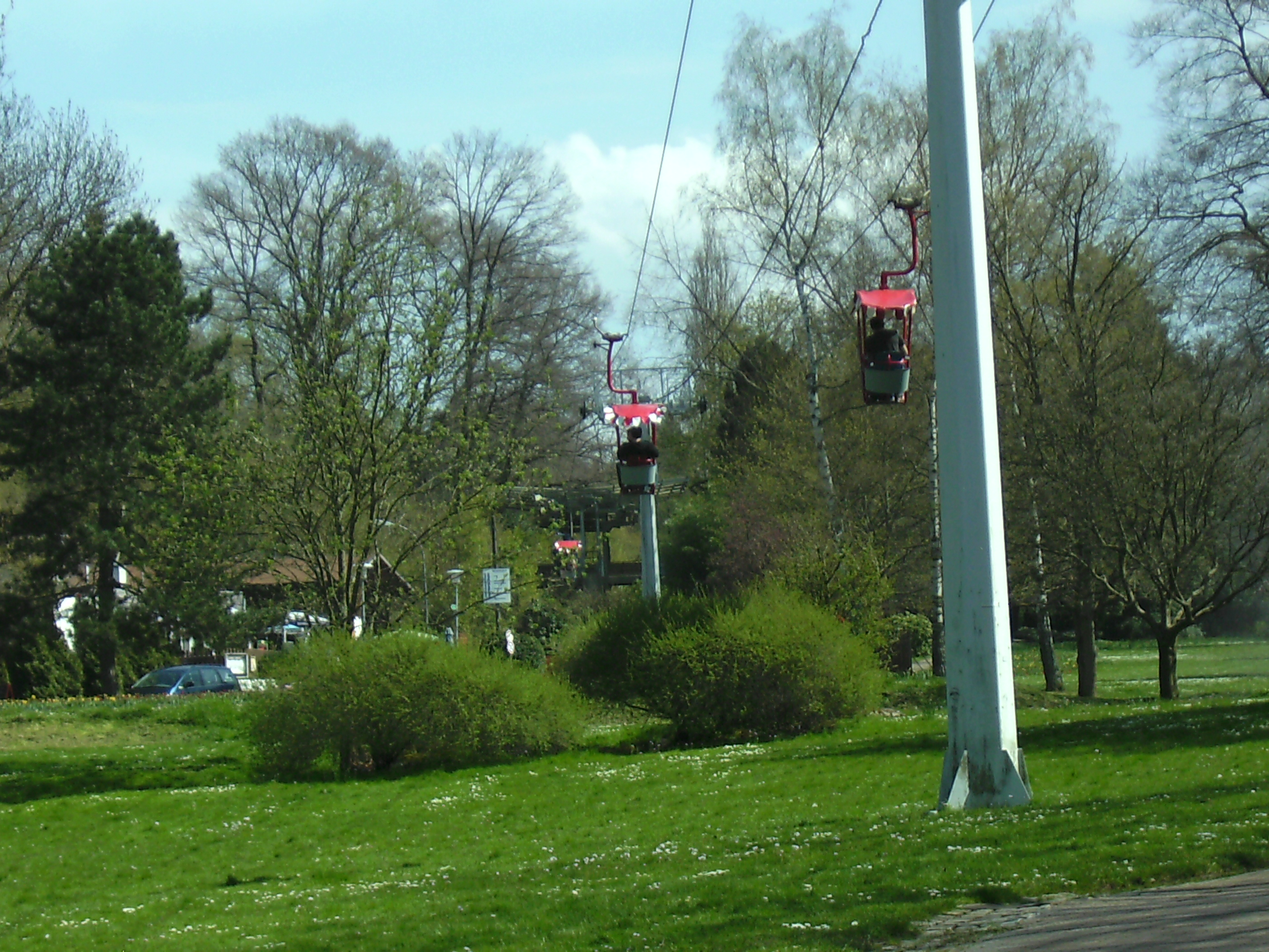 Saarbrücken: Deutsch-Französischer Garten, Seilbahn